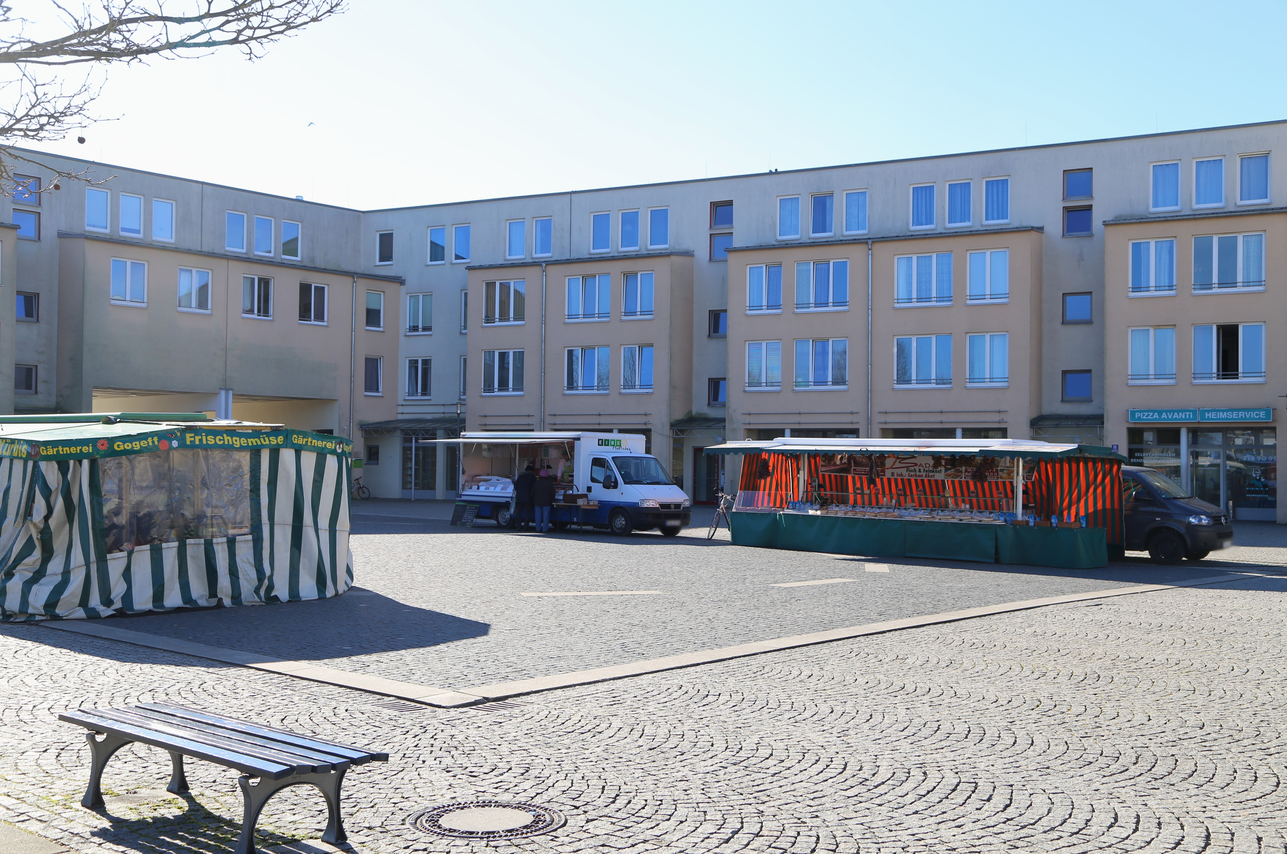 Walter-Sedlmayr-Platz, München